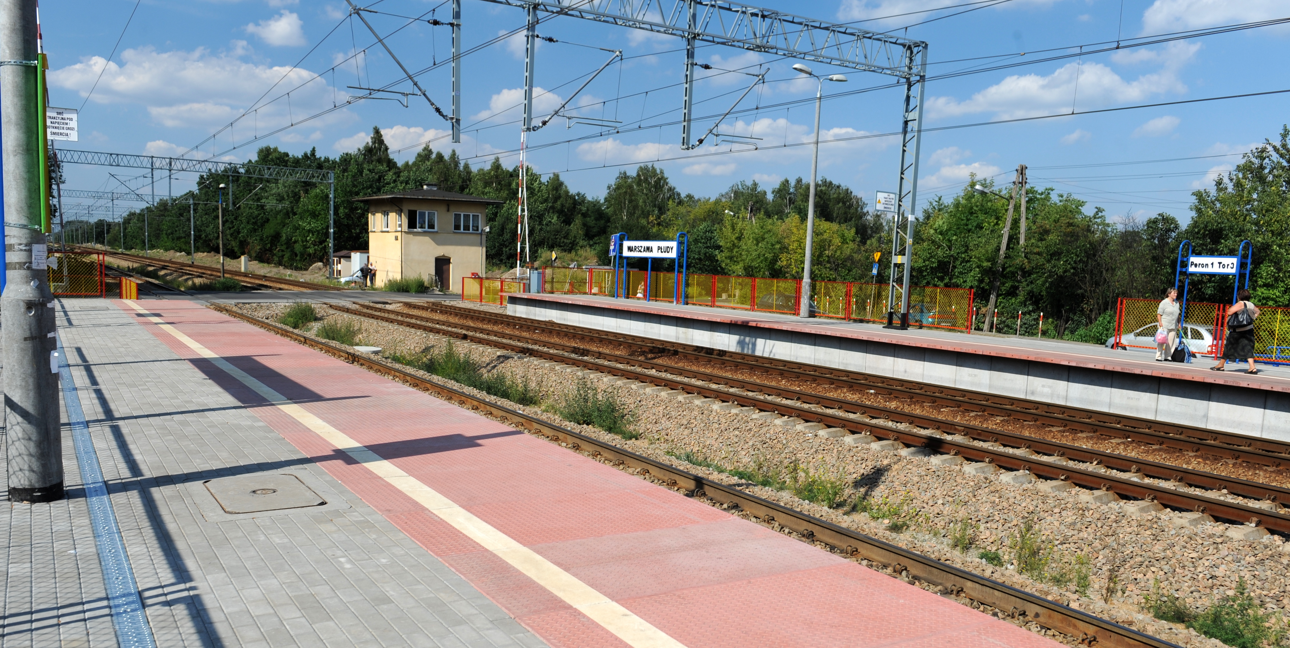 Stacja kolejowa Warszawa Płudy.